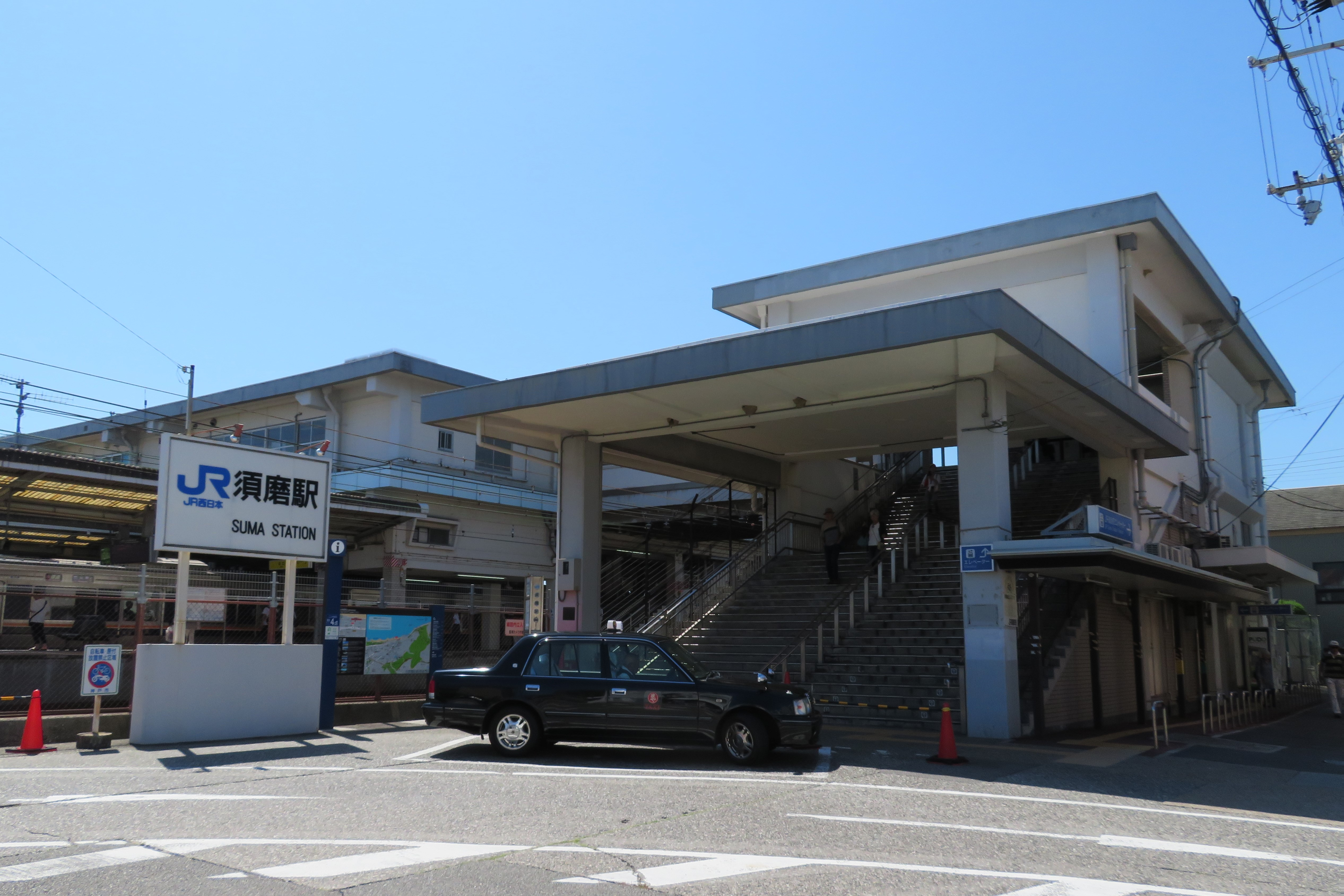 JR須磨駅